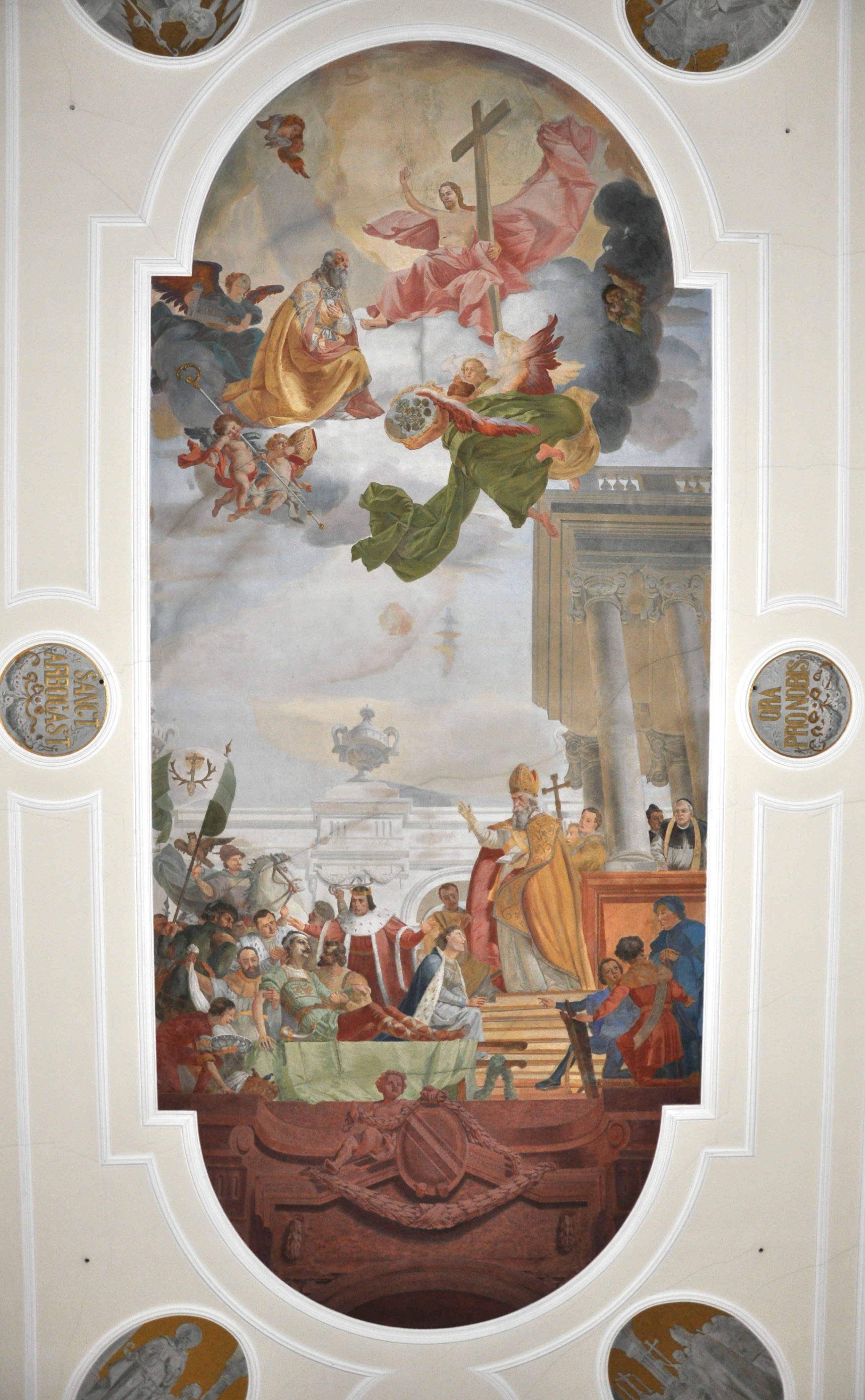 Haslach im Kinzigtal, katholische Pfarrkirche St. Arbogast, Deckenbild von Kaspar Schleibner, 1908, Hl. Arbogast (unten Auferweckung des Königssohnes Siegbert, oben Aufnahme des Heiligen in die ewige Seligkeit, der dort für Haslach bittet; siehe Stadtwappen)